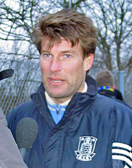 Michael Laudrup. Optaget efter træningskamp på Værløse Stadion.